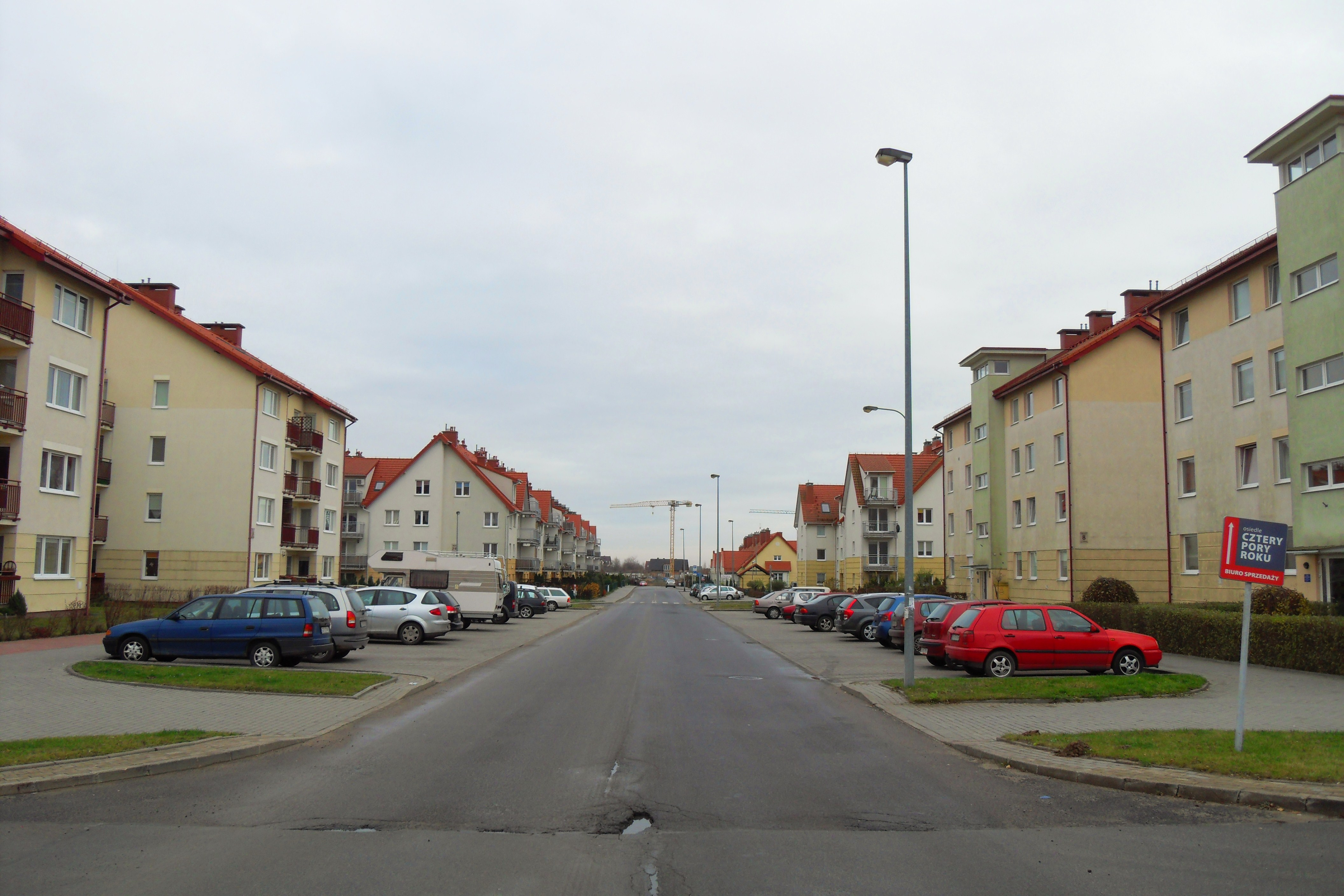 Gdańsk Chełm (Borkowo), ul. Tenisowa.